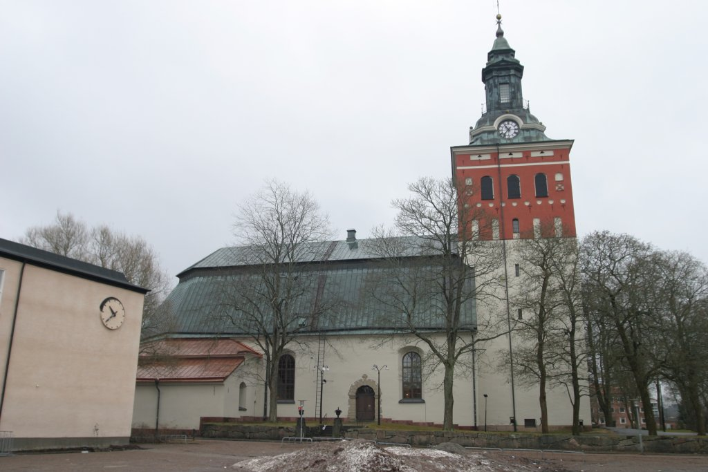 Kristina kyrka, Sala. Foto Olof Ekström 2005